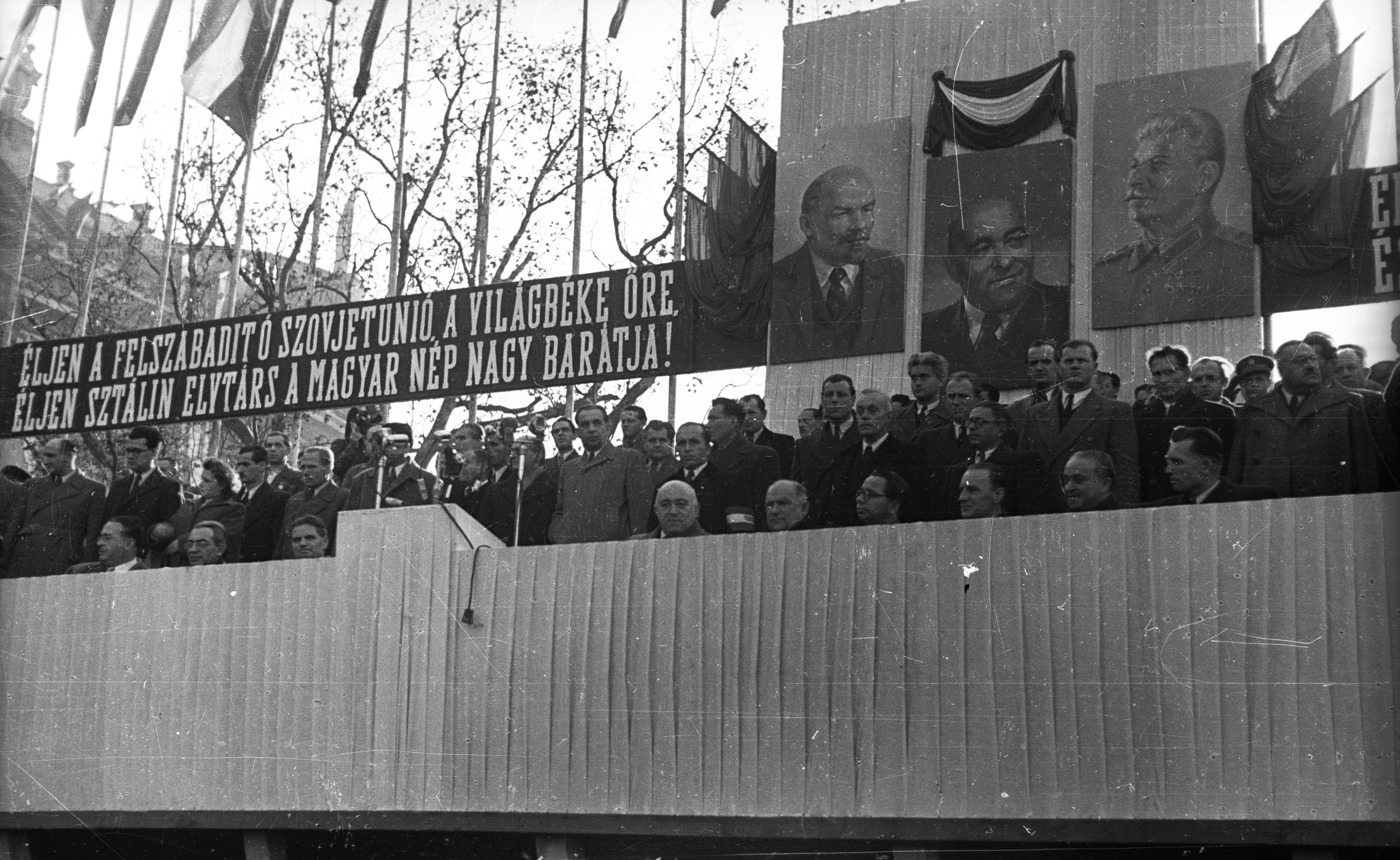 Széchenyi István (Roosevelt) tér, balra a mai Belügyminisztérium épülete látszik. Az újjáépített Lánchíd ünnepségének tribünjén az első sorában ülnek, balról: Vas Zoltán, Gerő Ernő, Dobi István, Rákosi Mátyás, Bebrits Lajos, Kállai Gyula, Kádár János, Ries István, Zsofinyecz Mihály. Location: Hungary, Budapest V. Tags: Lenin portrayal, Mátyás Rákosi portrayal, Joseph Stalin portrayal, Budapest, politician, celebrity Title: Széchenyi István (Roosevelt) tér, balra a mai Belügyminisztérium épülete látszik. Az újjáépített Lánchíd ünnepségének tribünjén az első sorában ülnek, balról: Vas Zoltán, Gerő Ernő, Dobi István, Rákosi Mátyás, Bebrits Lajos, Kállai Gyula, Kádár János, Ries István, Zsofinyecz Mihály.